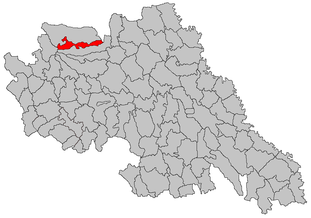 Categorie:Hărţi ale judeţului Iaşi